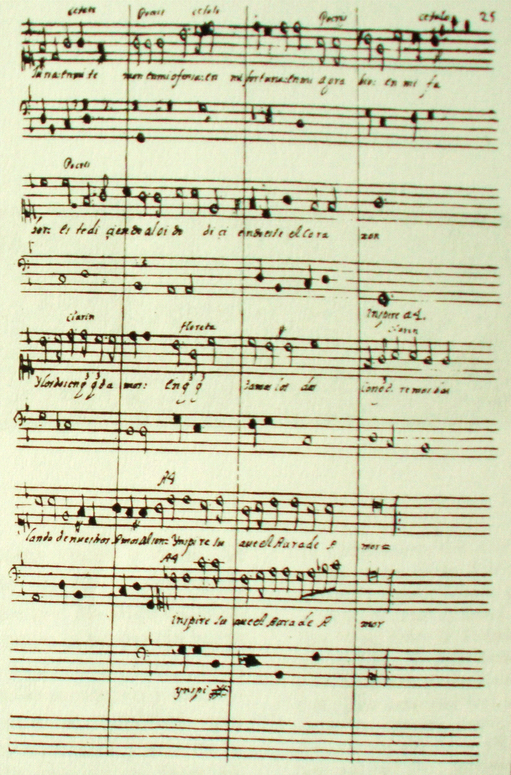 Partitura "Celos aun del aire matan"